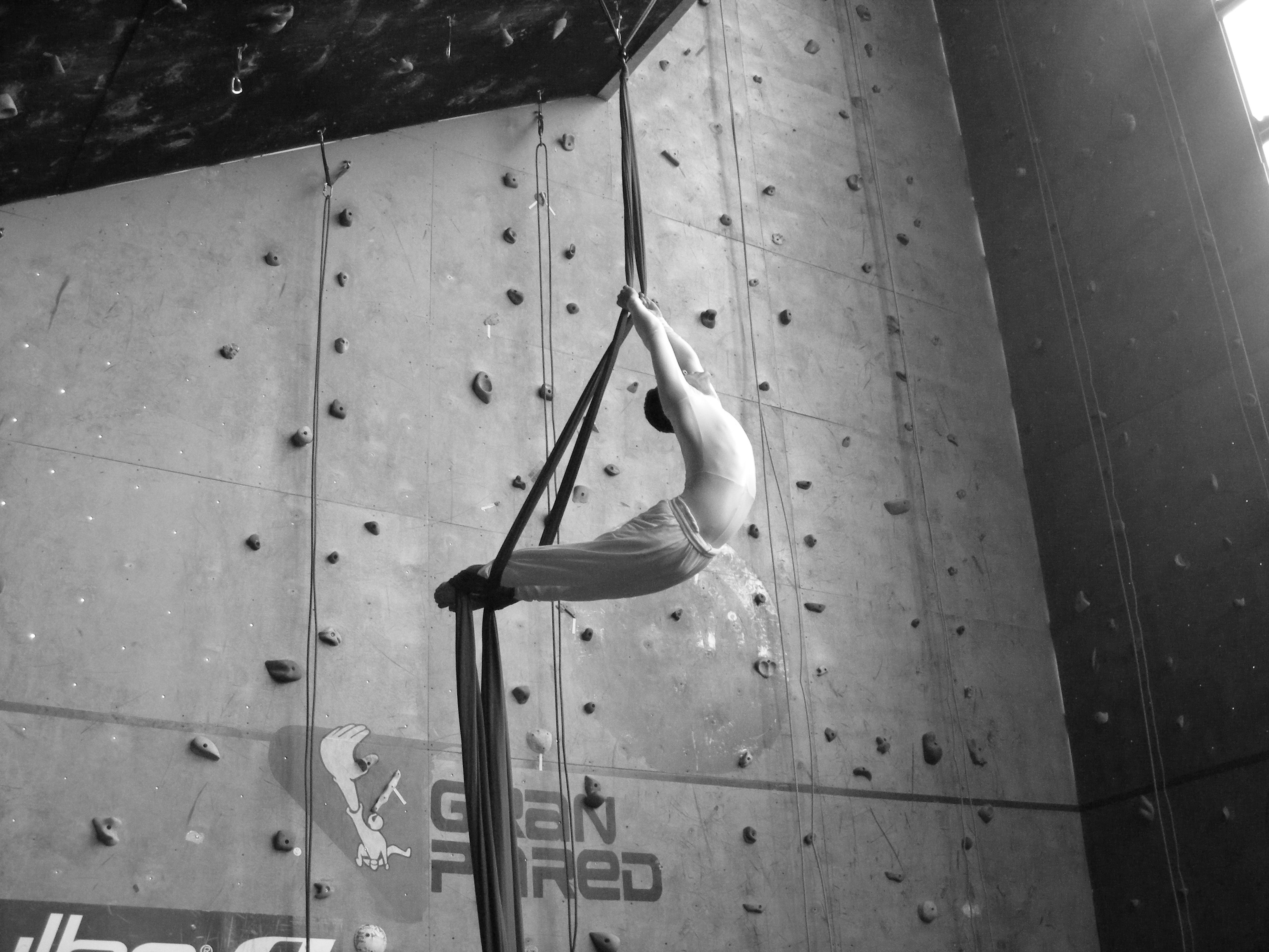 Projecto de danza aerea airdancelive Interprete:ivan torres